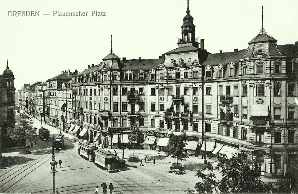 .Dresden: Der ehemaliger Plauenscher Platz befand sich in der Seevorstadt-West und war ein Kreuzungspunkt der Ammonstraße. Er lag in der Gemarkung Altstadt I und im statistischen Stadtteil Wilsdruffer Vorstadt/Seevorstadt-West. Die ursprüngliche großzügige runde Fassung des Platzes der Bebauung vor dem Ersten Weltkrieg ist durch die Zerstörung 1945 und die anschließende Enttrümmerung verloren gegangen. Ein Wiederaufbau der zerstörten Gebäude entlang der Ammonstraße und des Plauenschen Platzes fand nicht statt. Die enttrümmerten Flächen sind teils Grünanlagen und verwilderte Flächen. Mit dem Bau des Verkehrzuges Brücke Budapester Straße in den Jahren von 1963 bis 1967 wurde der Plauensche Platz überbaut. Auf dem einstigen Areal befinden sich die Aus- und Zufahrt der Budapester Straße und ein Busabstellplatz.